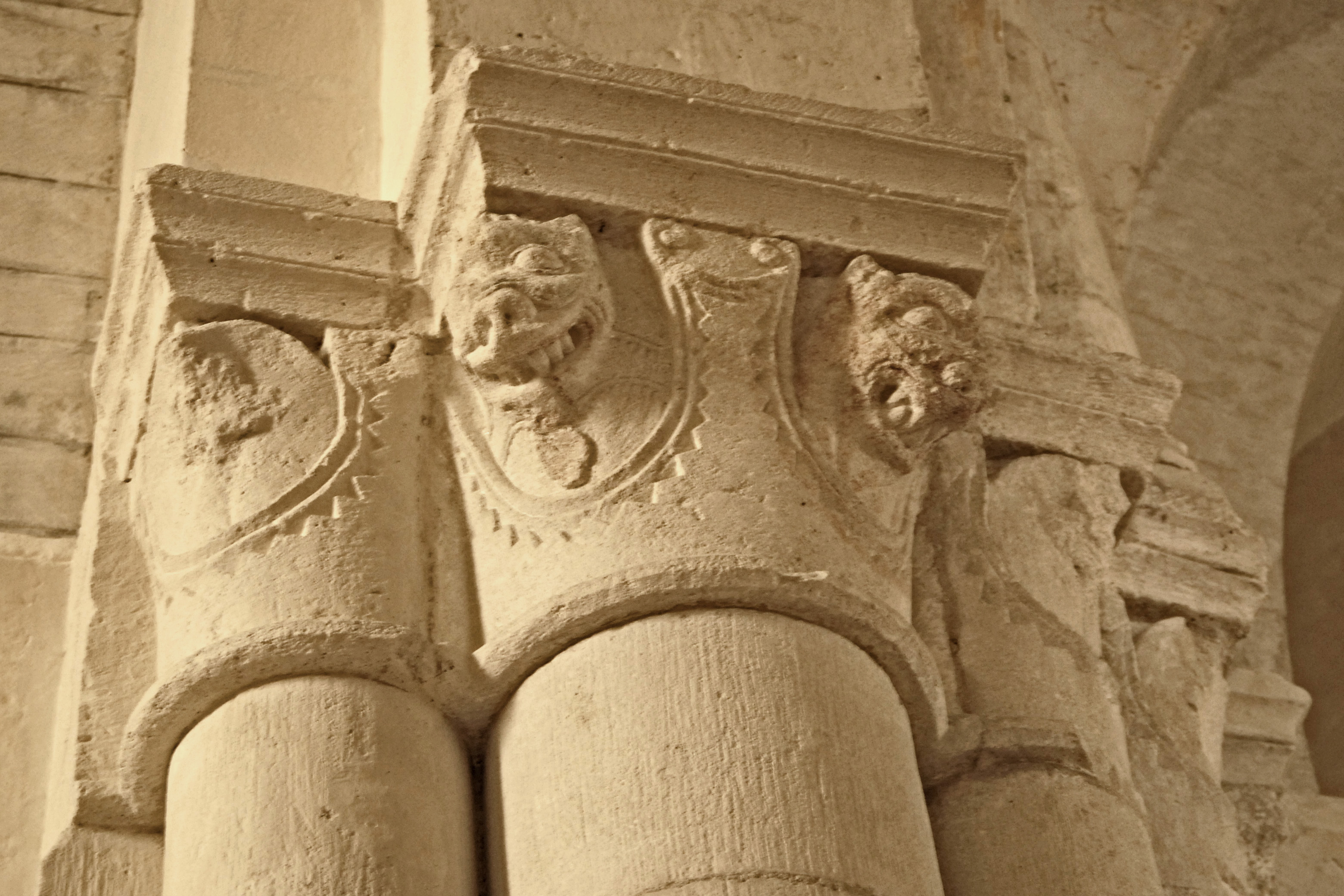 Notre-Dame Corme-Écluse, Ansicht von SW